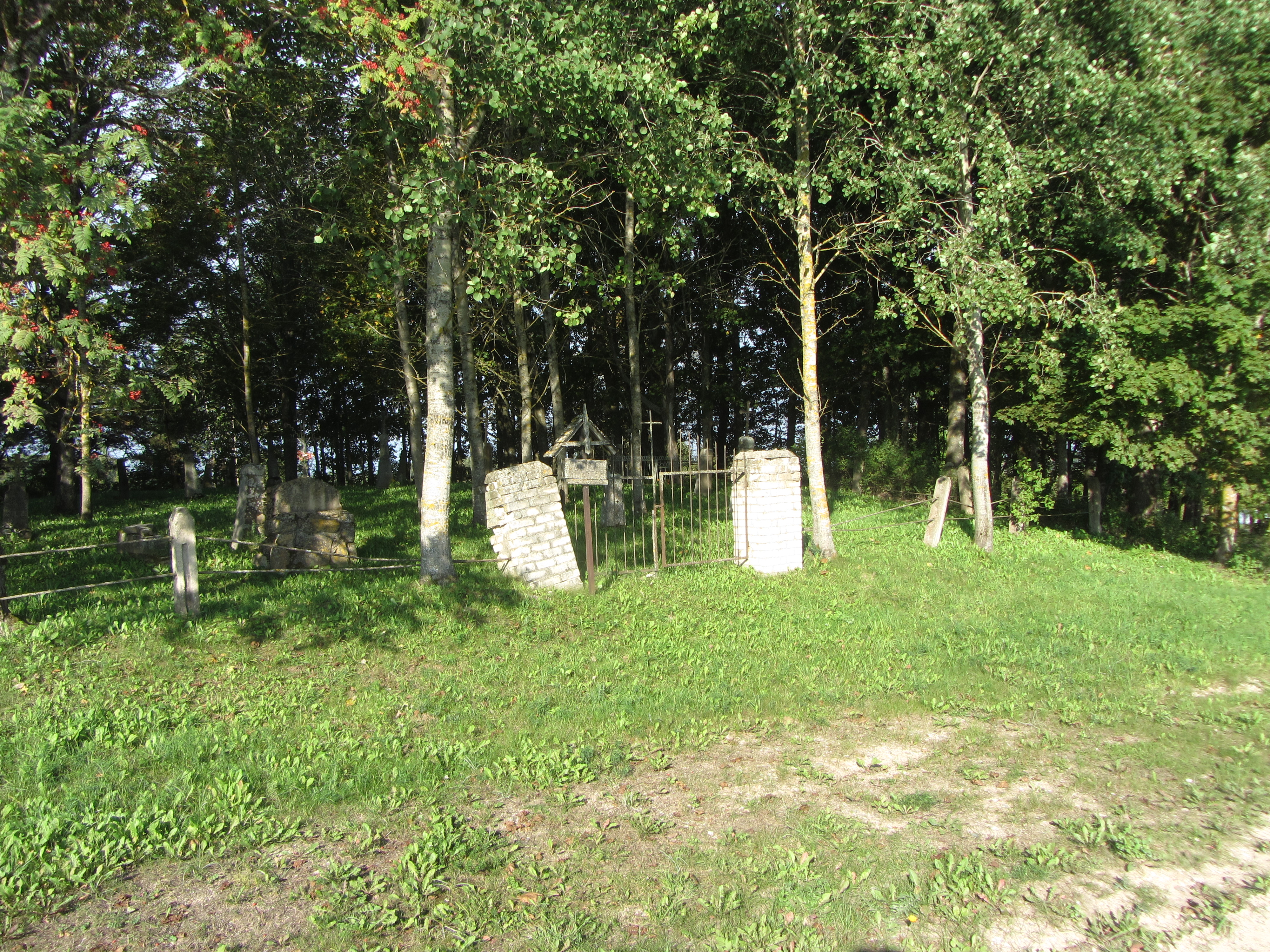 Jakėnai 30250, Lithuania